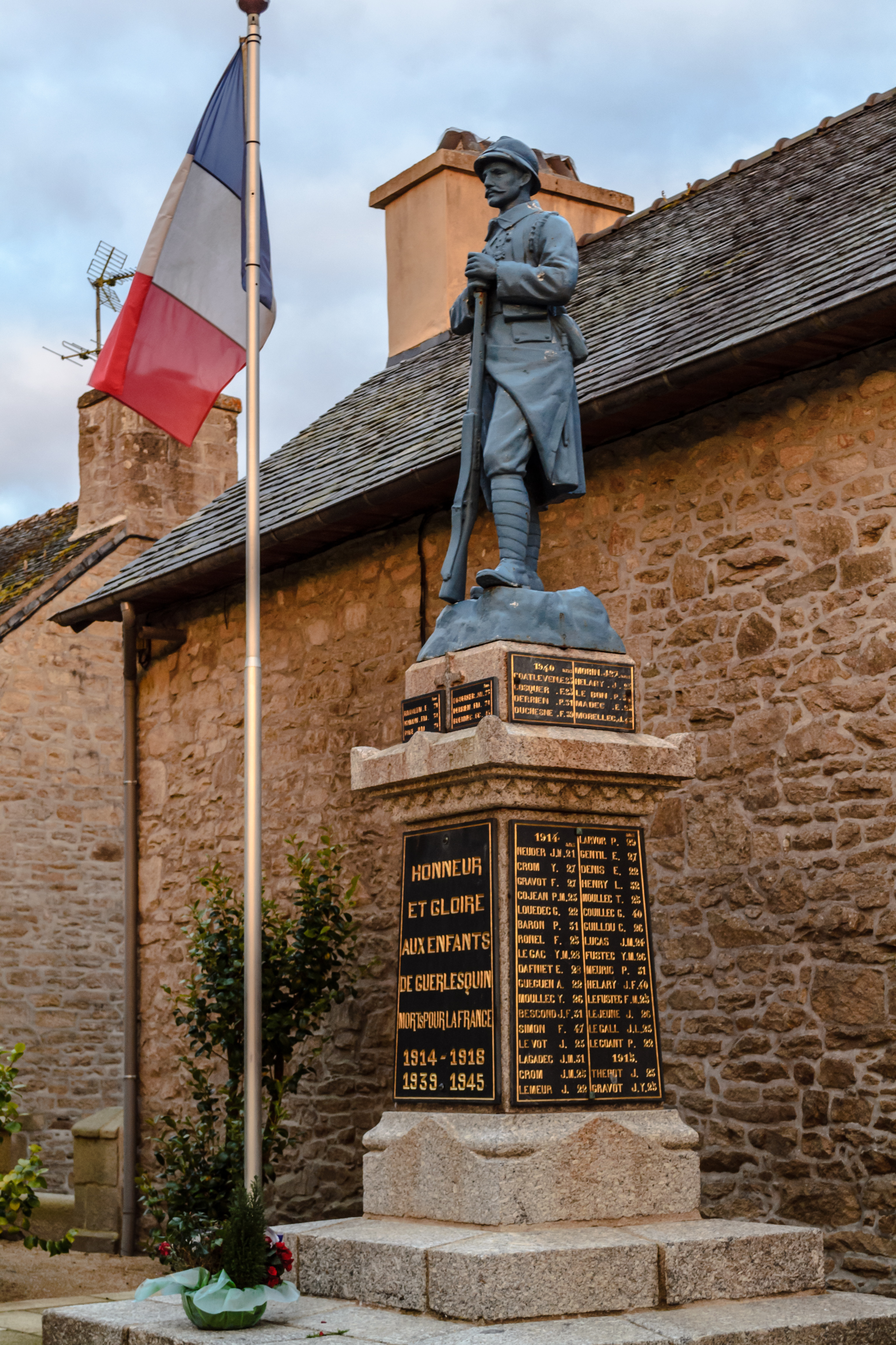 Monument aux morts de Guerlesquin (29).